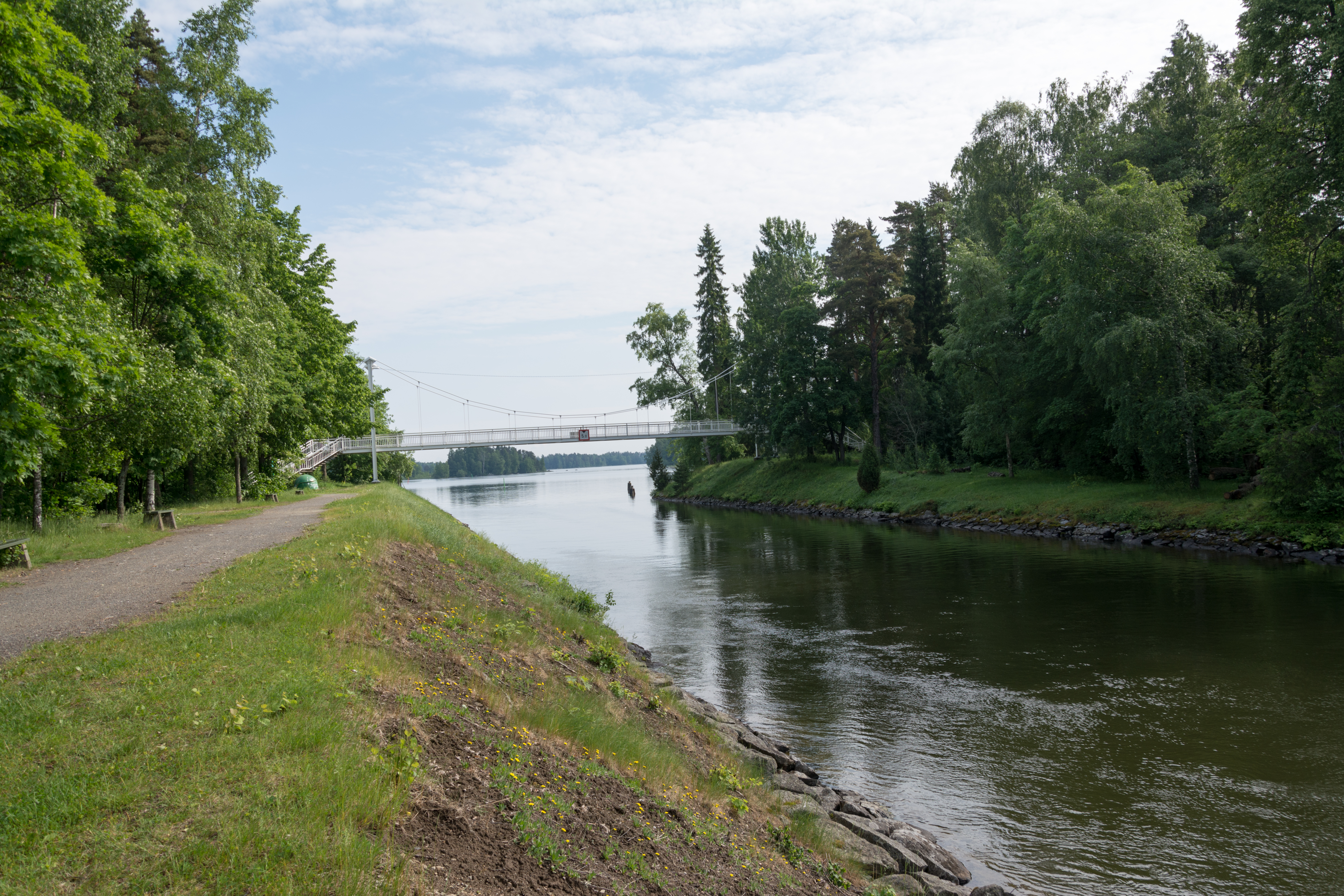 Apian kanava Valkeakoskella